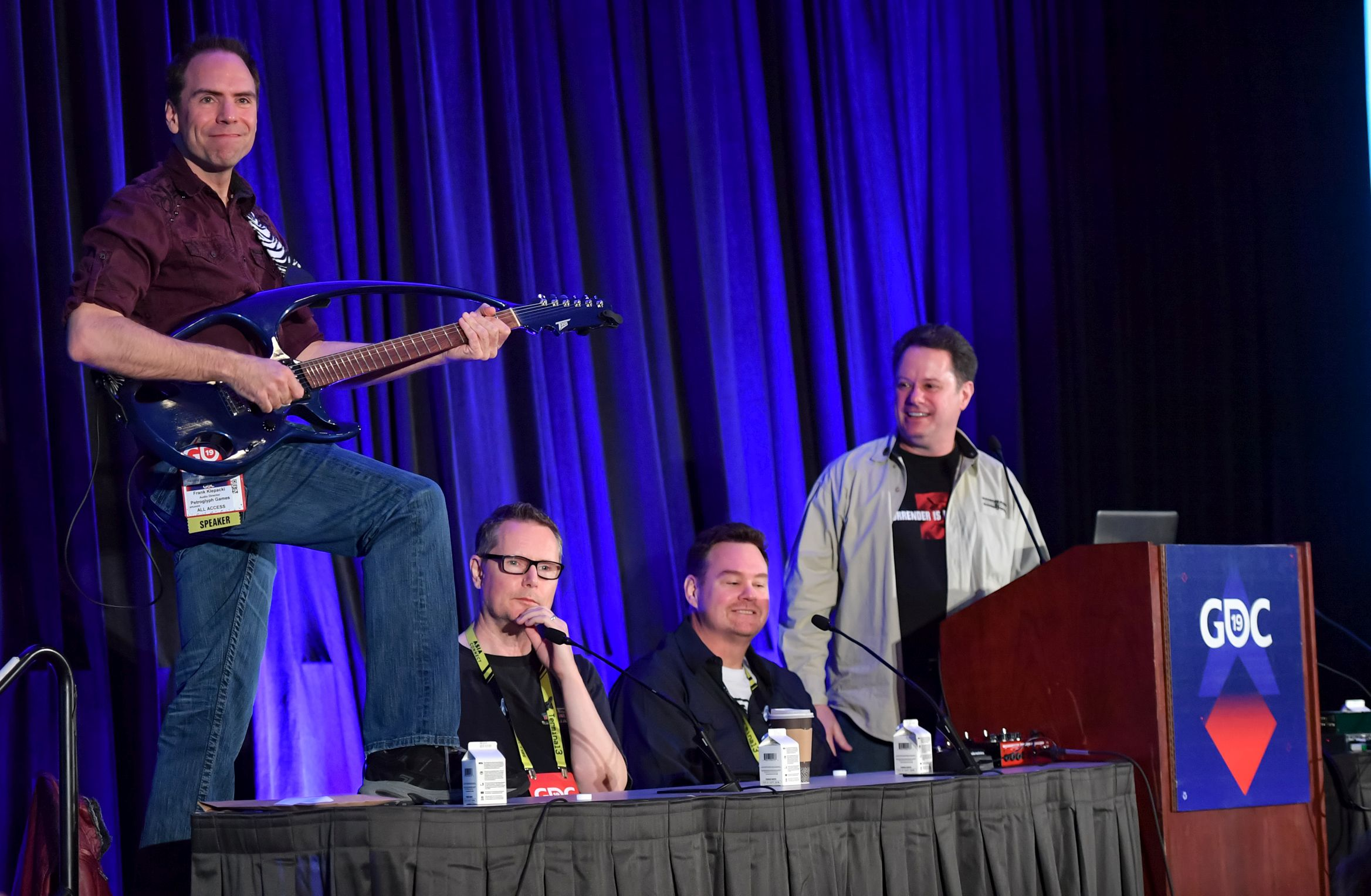 1D5_6186